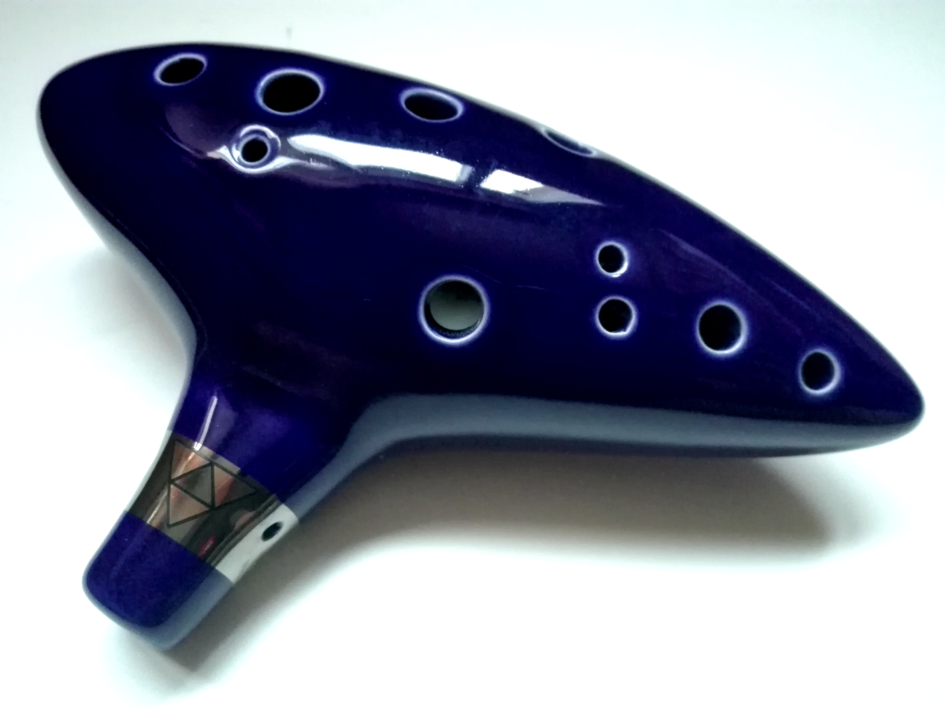 Ocarina de cerámica con 12 agujeros. Recreación de la ocarina del tiempo del videojuego La Leyenda de Zelda: Ocarina of Time.